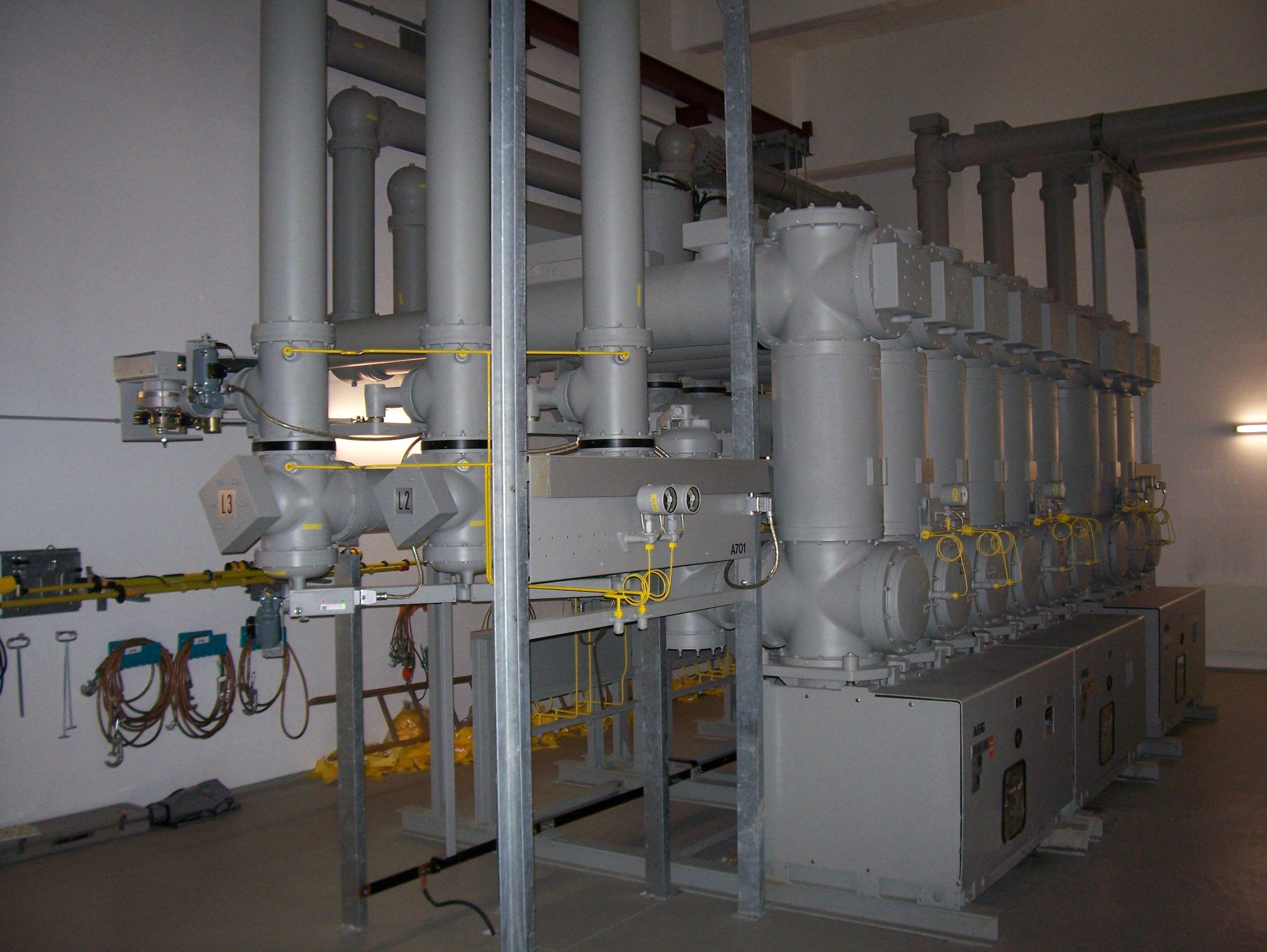 Umspannanlage der EVN in Österreich: Innenraumschaltanlage mit gasisolierten Rohrleitern, SF6-Schaltanlage für 110 kV Kamera: Kodak C663 Danksagung: Unter freundlicher Mitwirkung und Unterstützung der: EVN AG, EVN Platz, 2344 Maria Enzersdorf, Hr. E. Jungwirth & Hr. Mag. S. Zach